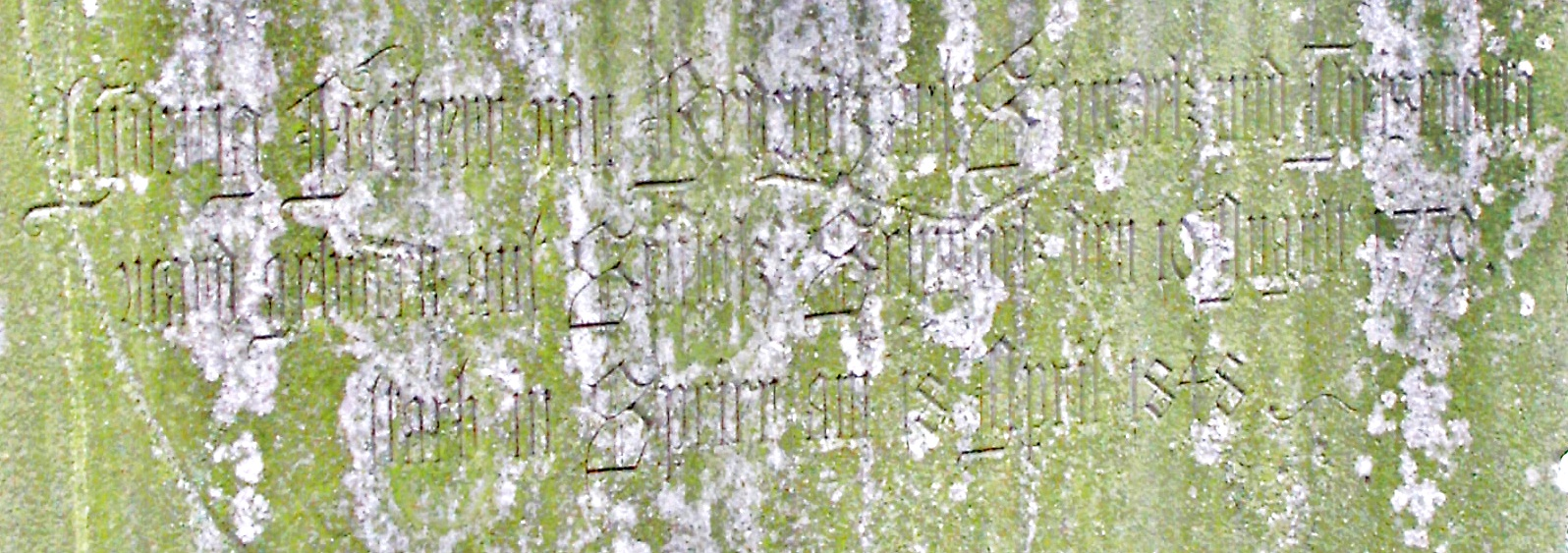 Grabinschrift Ludwig Freiherr von Redwitz (1779-1848), Speyer, Alter Friedhof (Vater des Dichters Oskar von Redwitz)